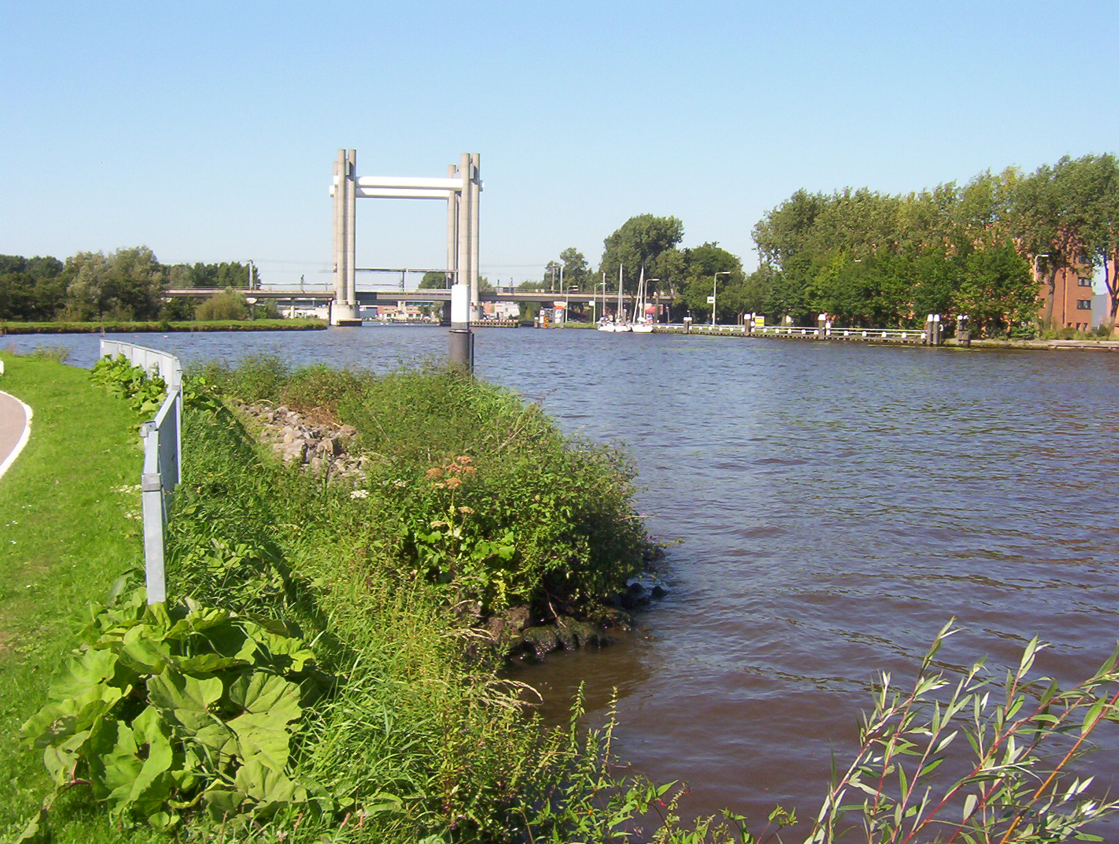 Fauna-uitstapplaats in Gouwekanaal. Eigen foto, augustus 2005